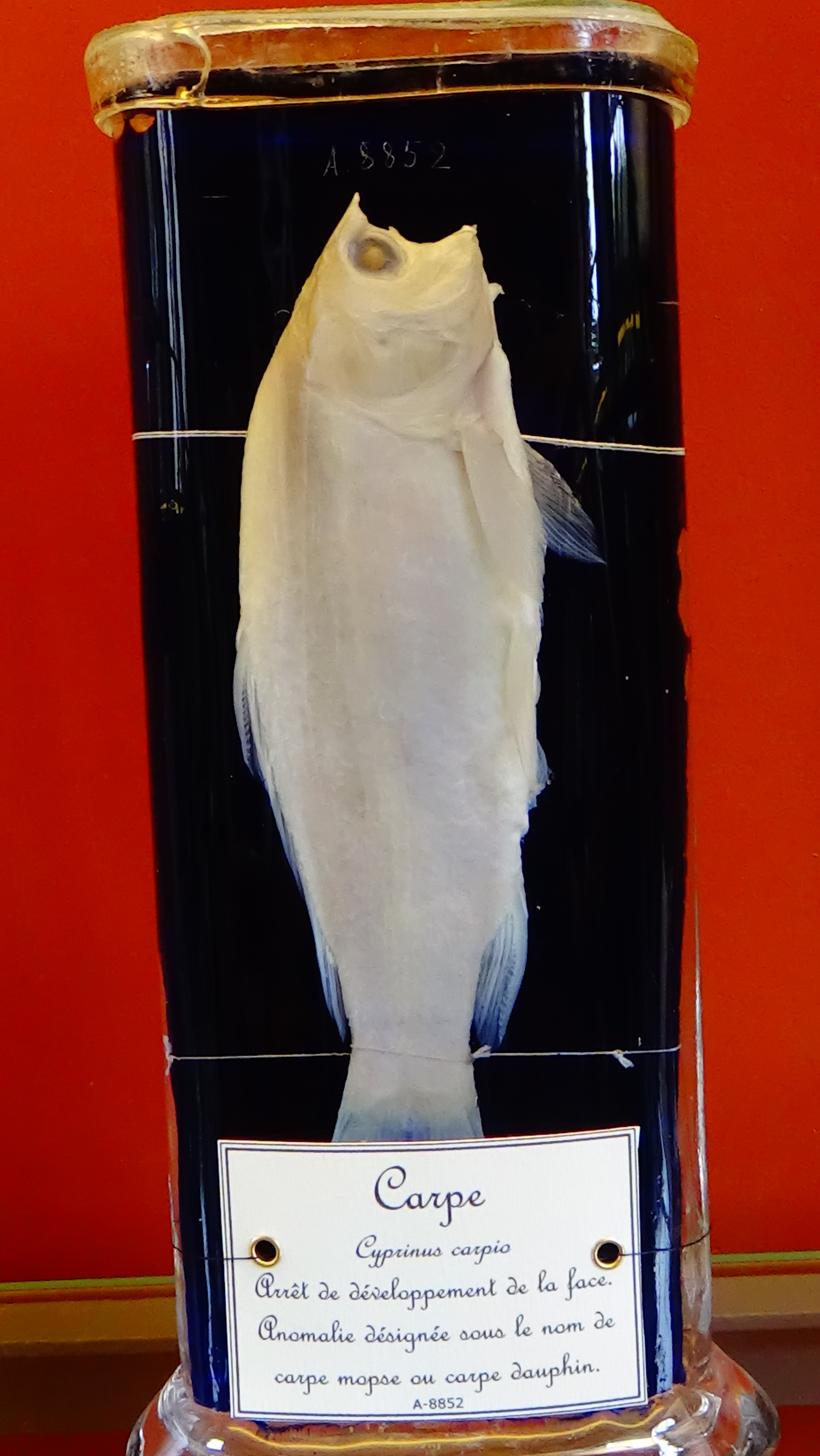 Cyprinus carpio - arrêt du développement de la face - Anomalie désigné - Carpe mopse ou Carpe dauphin - Anatomie comparé Mnhn Paris